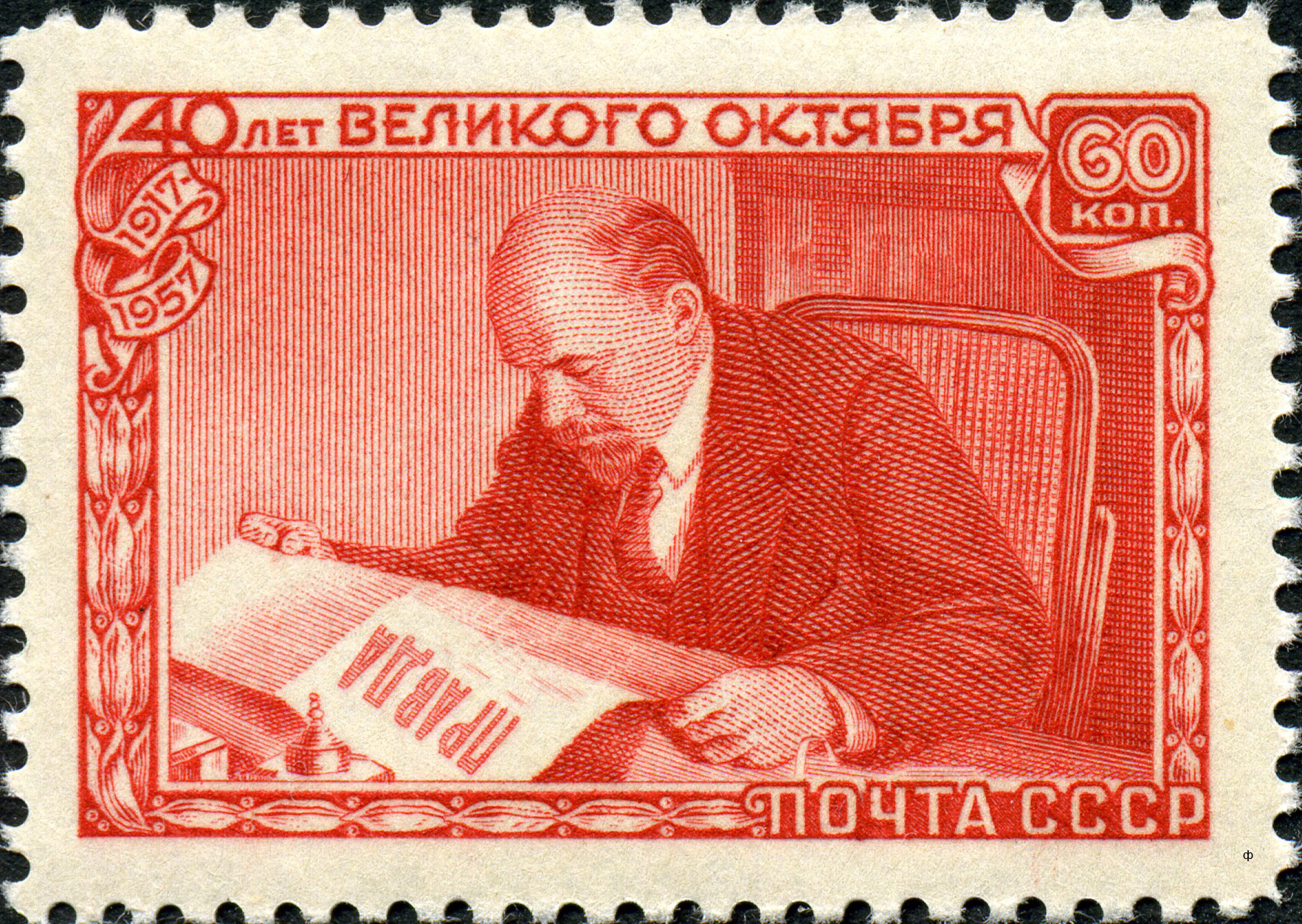 Марка СССР